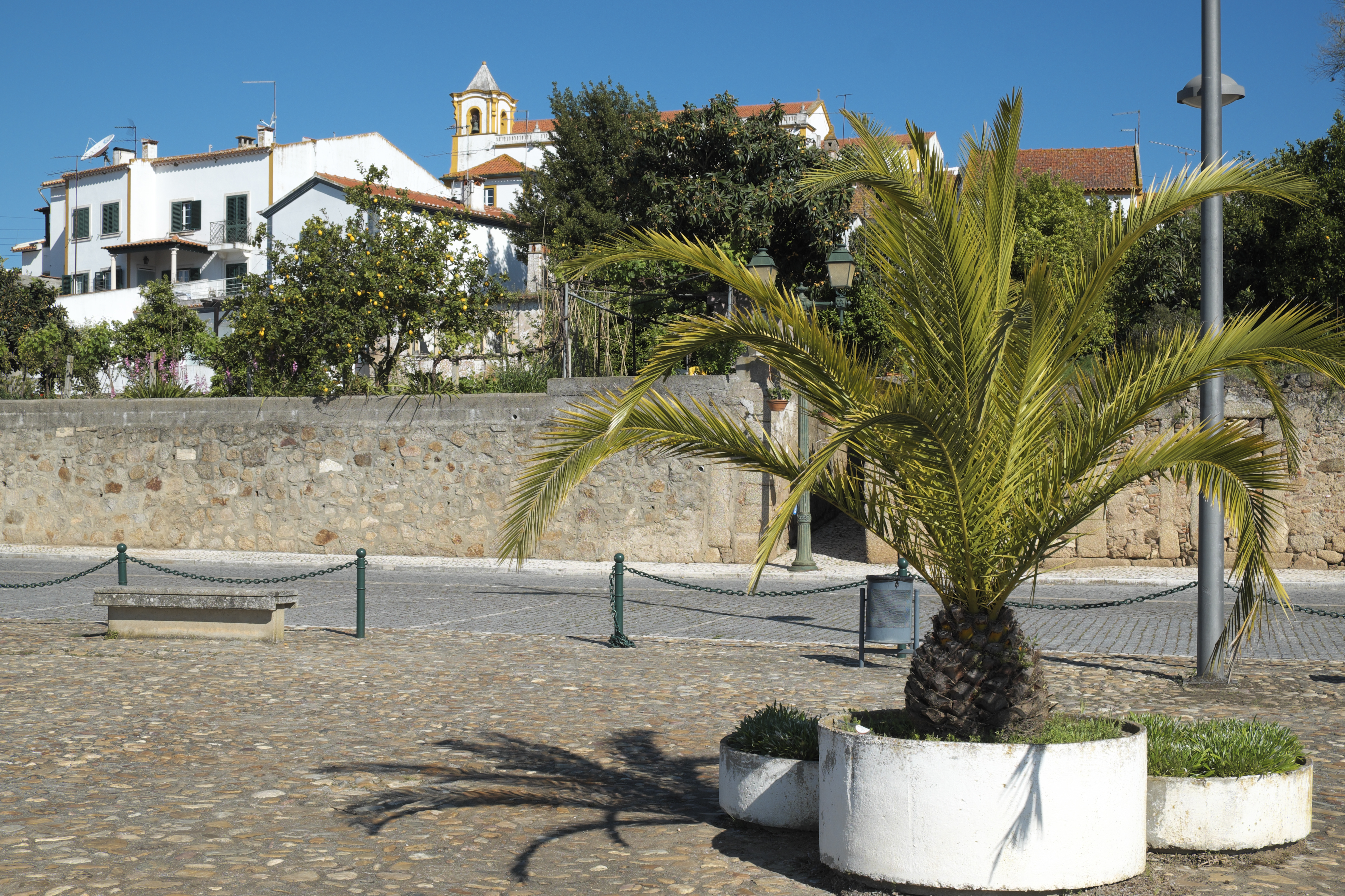 Tancos (Vila Nova da Barquinha) im Distrikt Santarém in Portugal